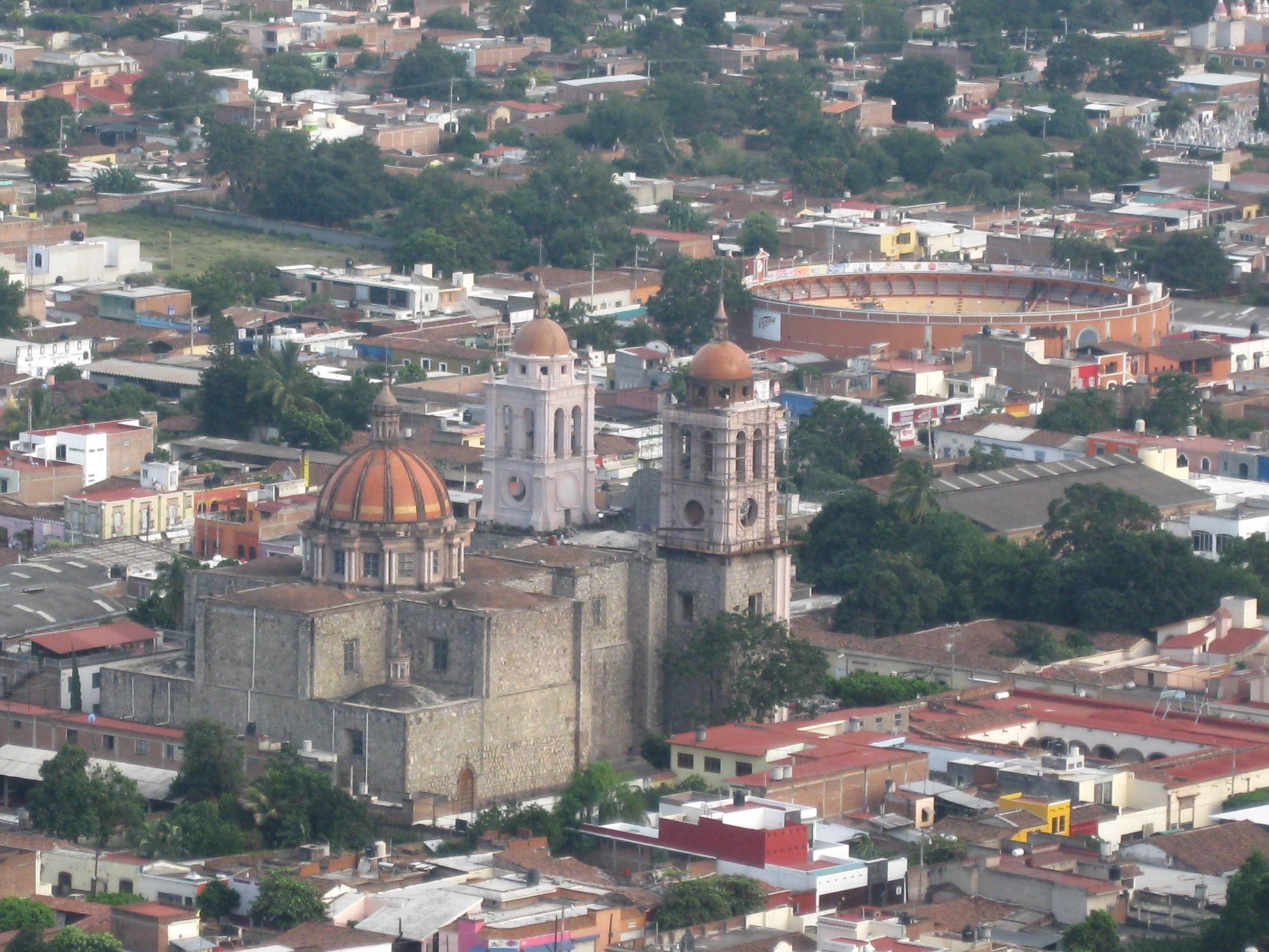 Catedral y Plaza de toros, vista desde el Cerro de la Capilla